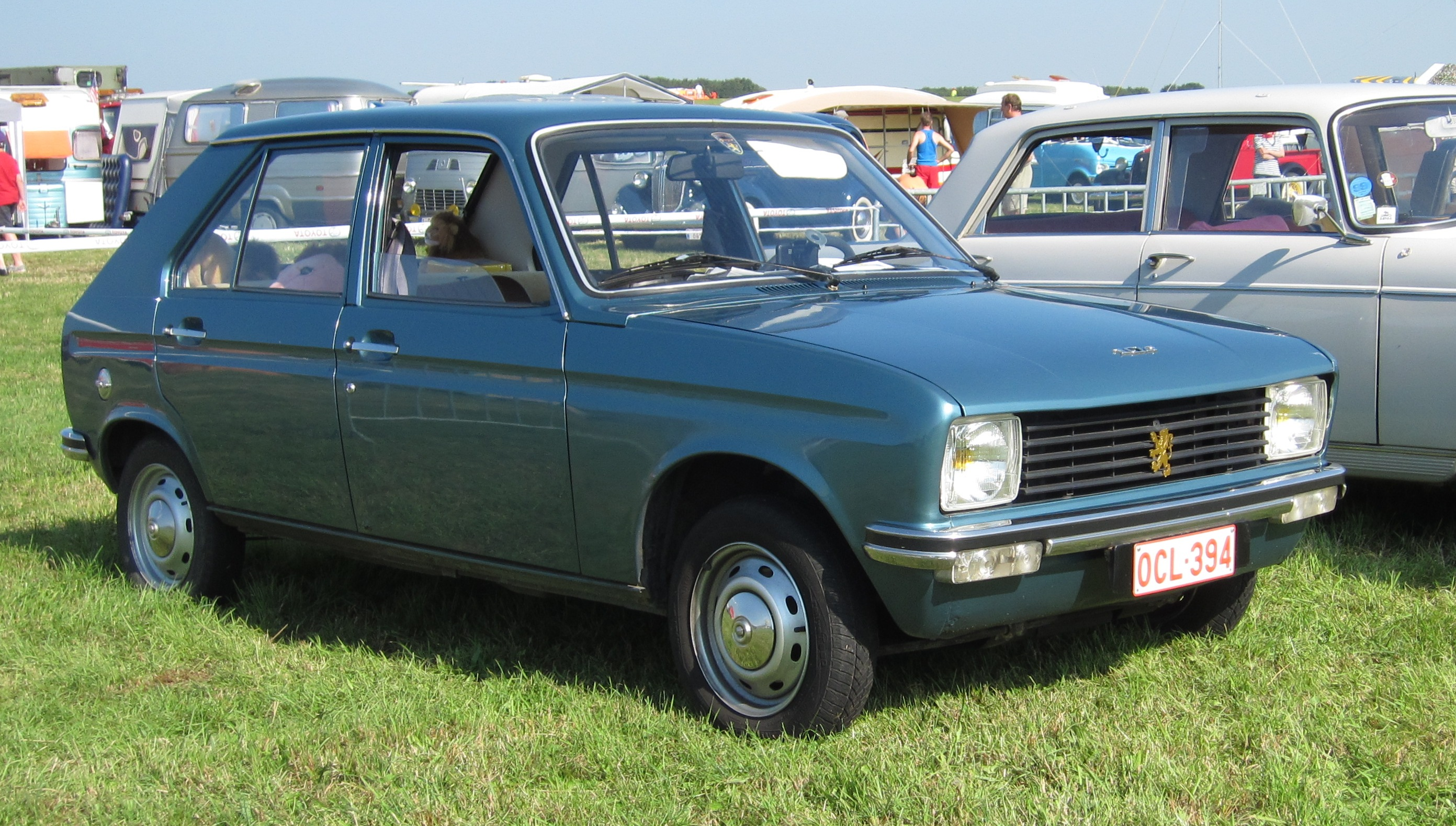 Peugeot 104 vers 1975